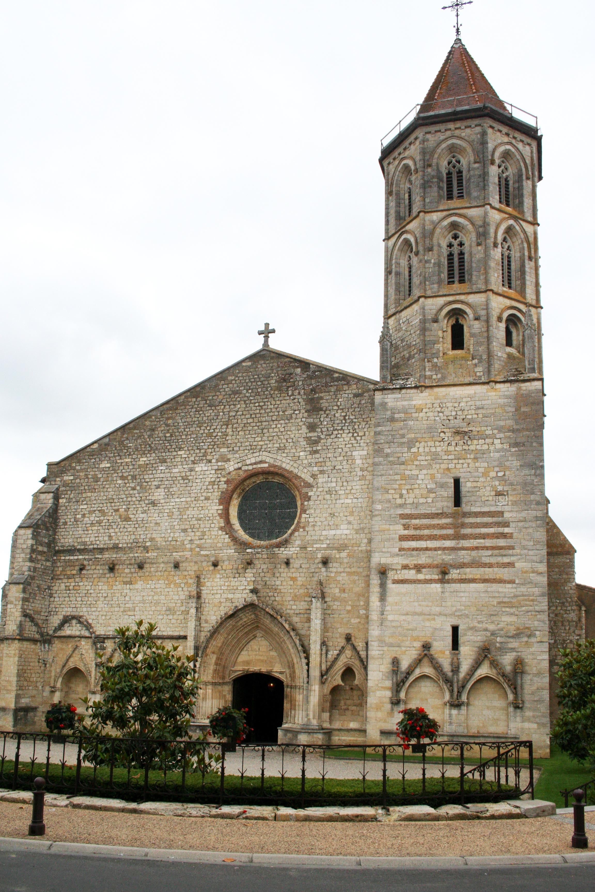 Église Saint-Laurent de Fleurance (Gers, France), façade et clocher